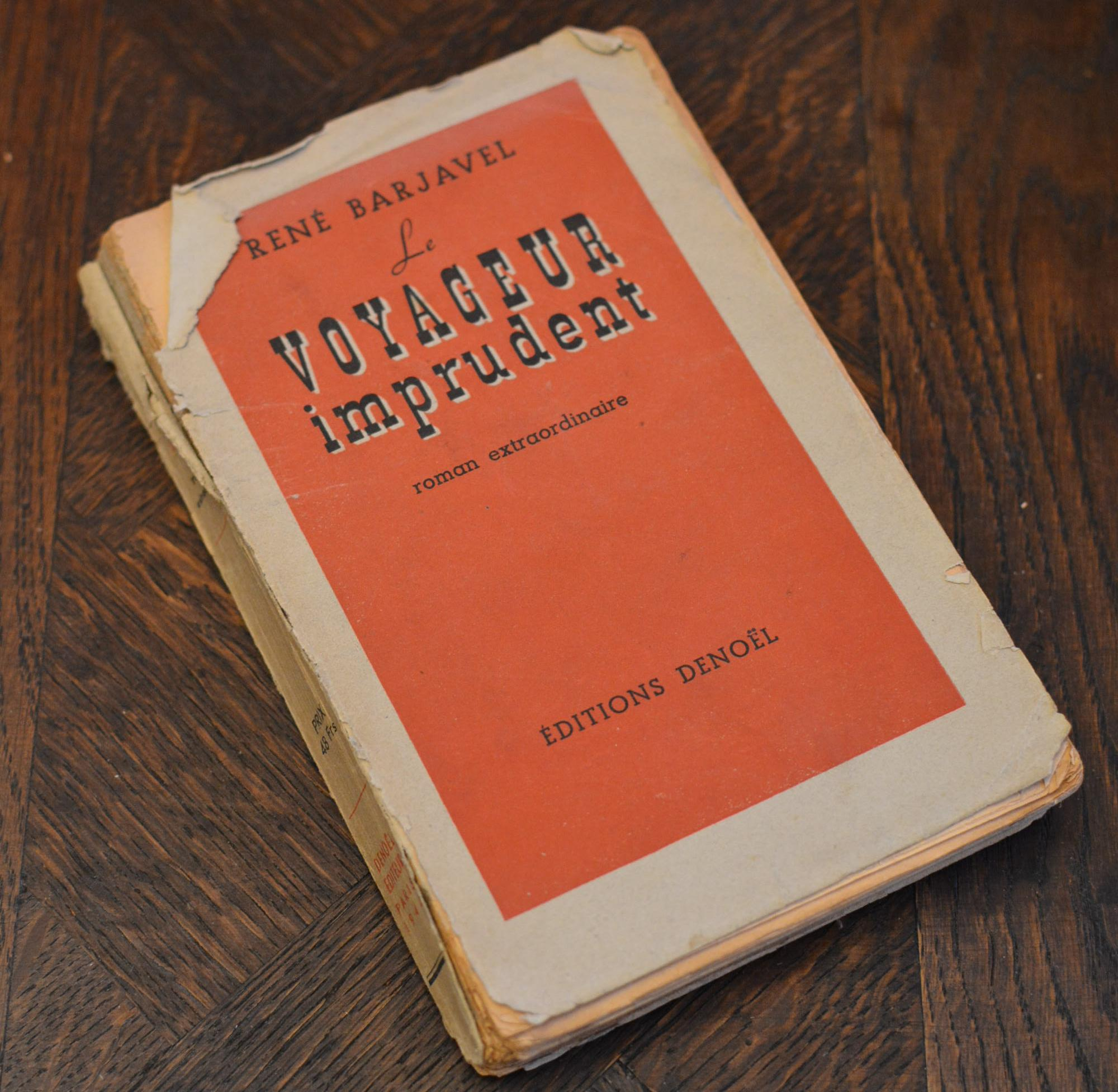 Couverture du Voyageur imprudent de Barjavel dans son édition originale